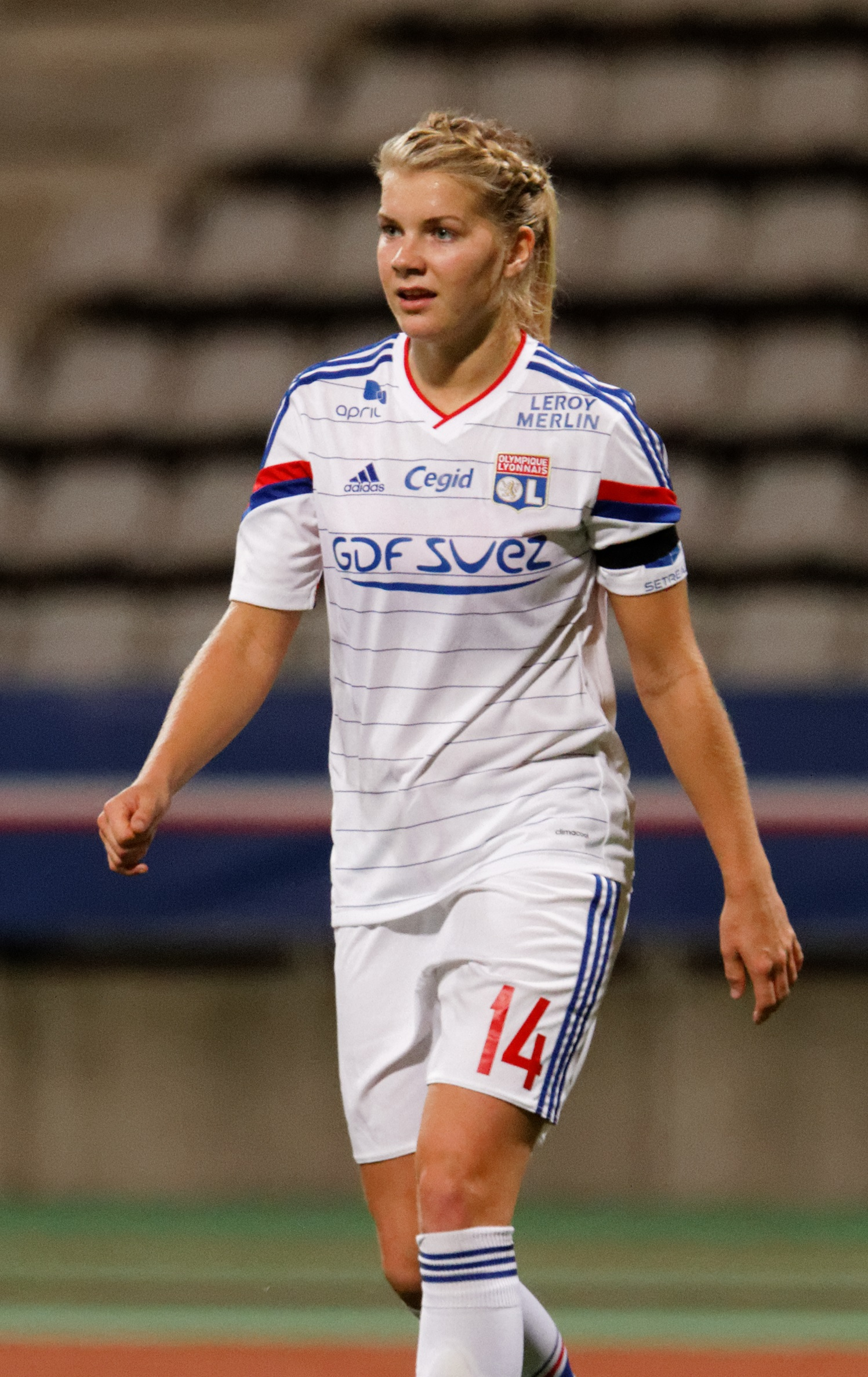 Ligue des champions, PSG - Lyon , 8 novembre 2014.